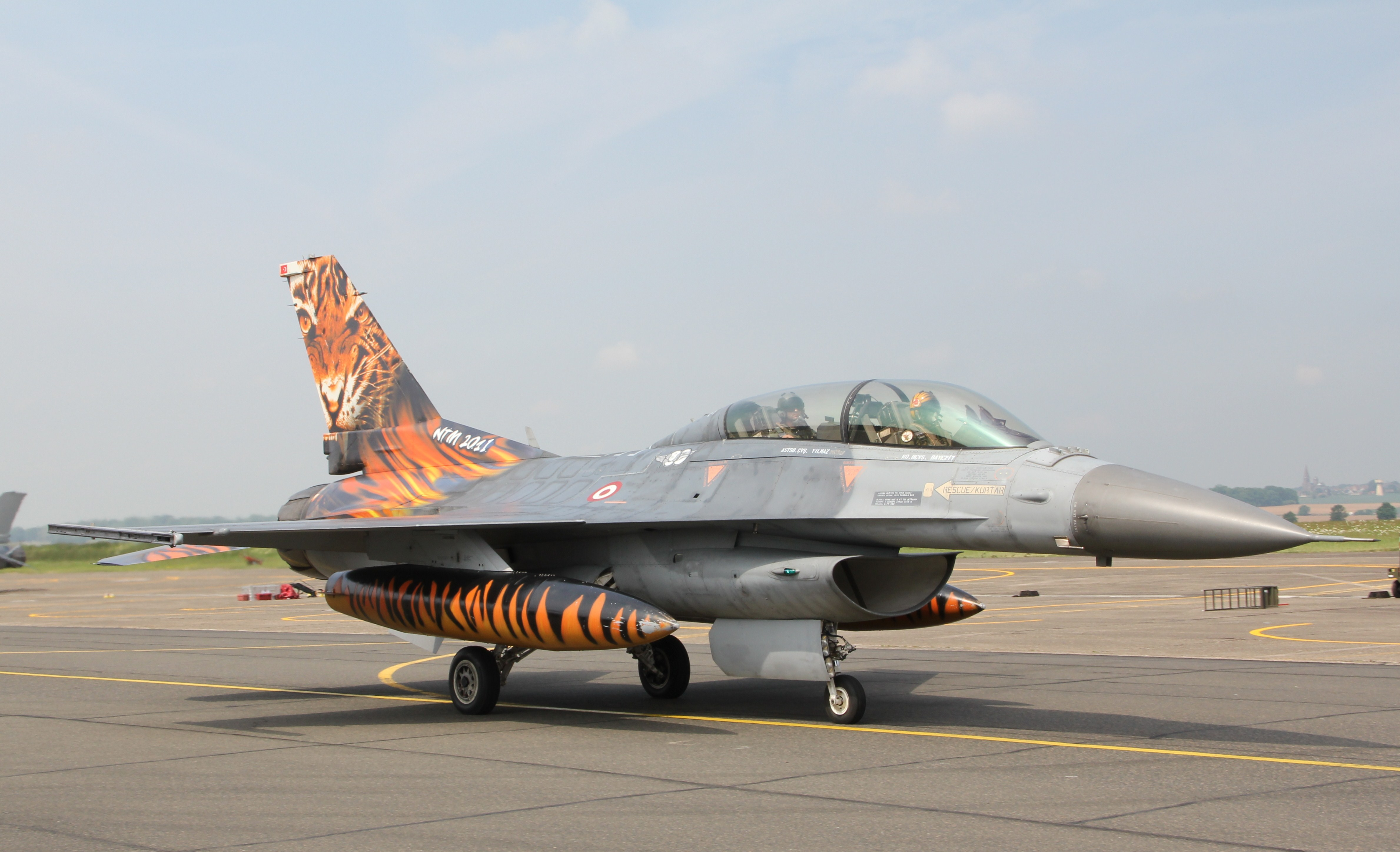 Turkish AF F-16D